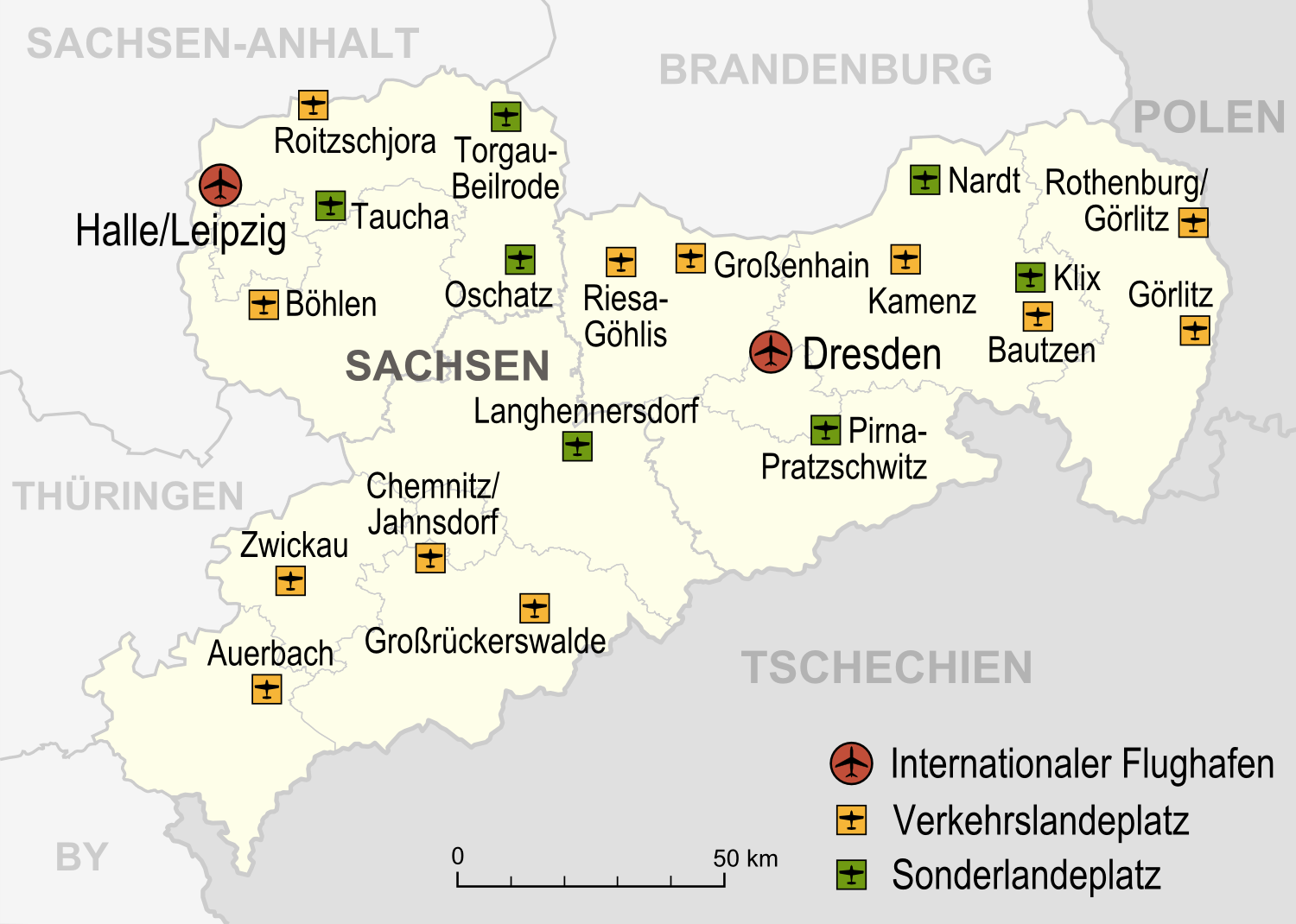 Flughäfen, Verkehrslandeplätze, Sonderlandeplätze und Wasserlandeplätze in Sachsen, Stand 2007